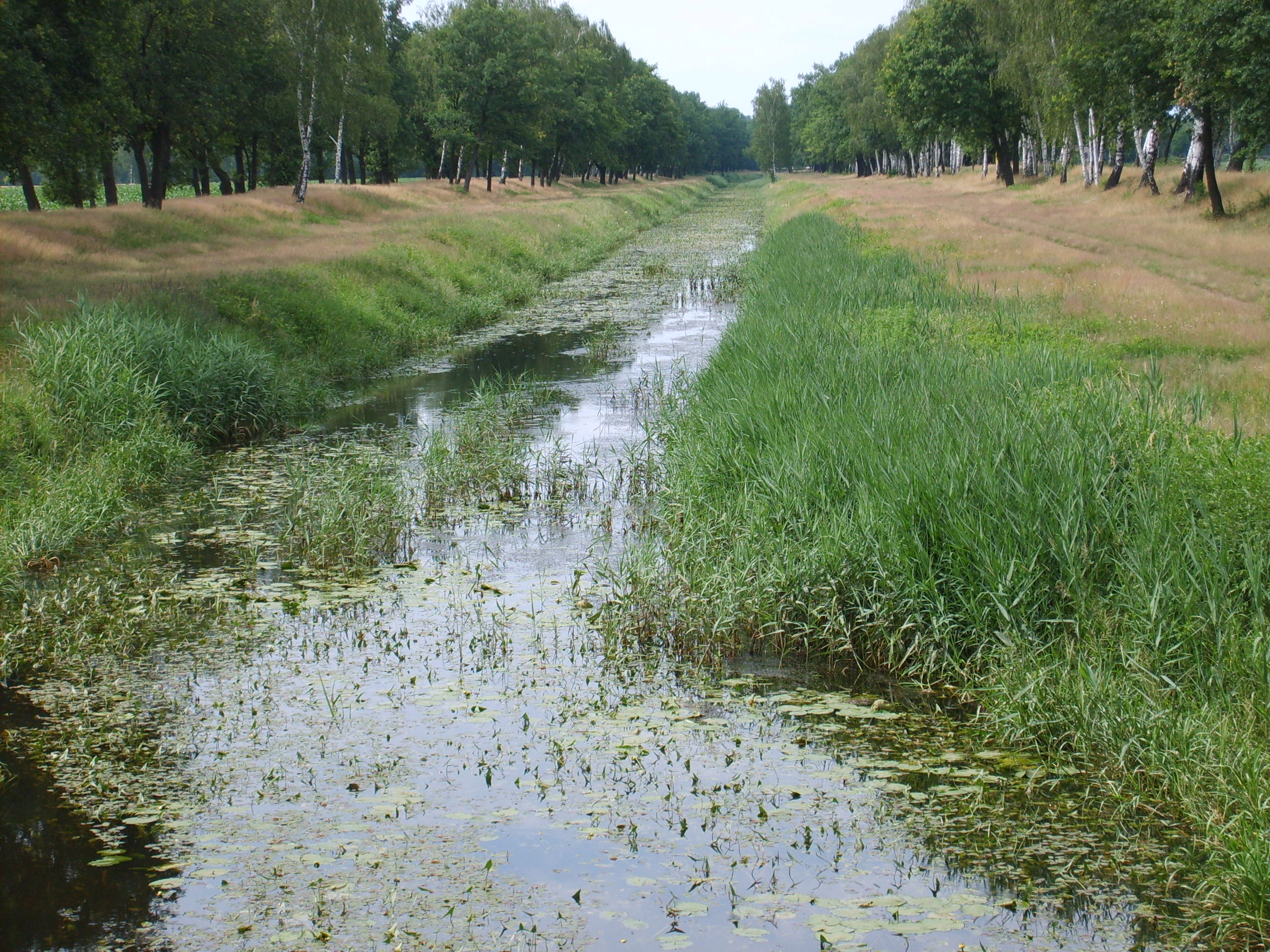 Der Fluss Pulsnitz bei Elsterwerda